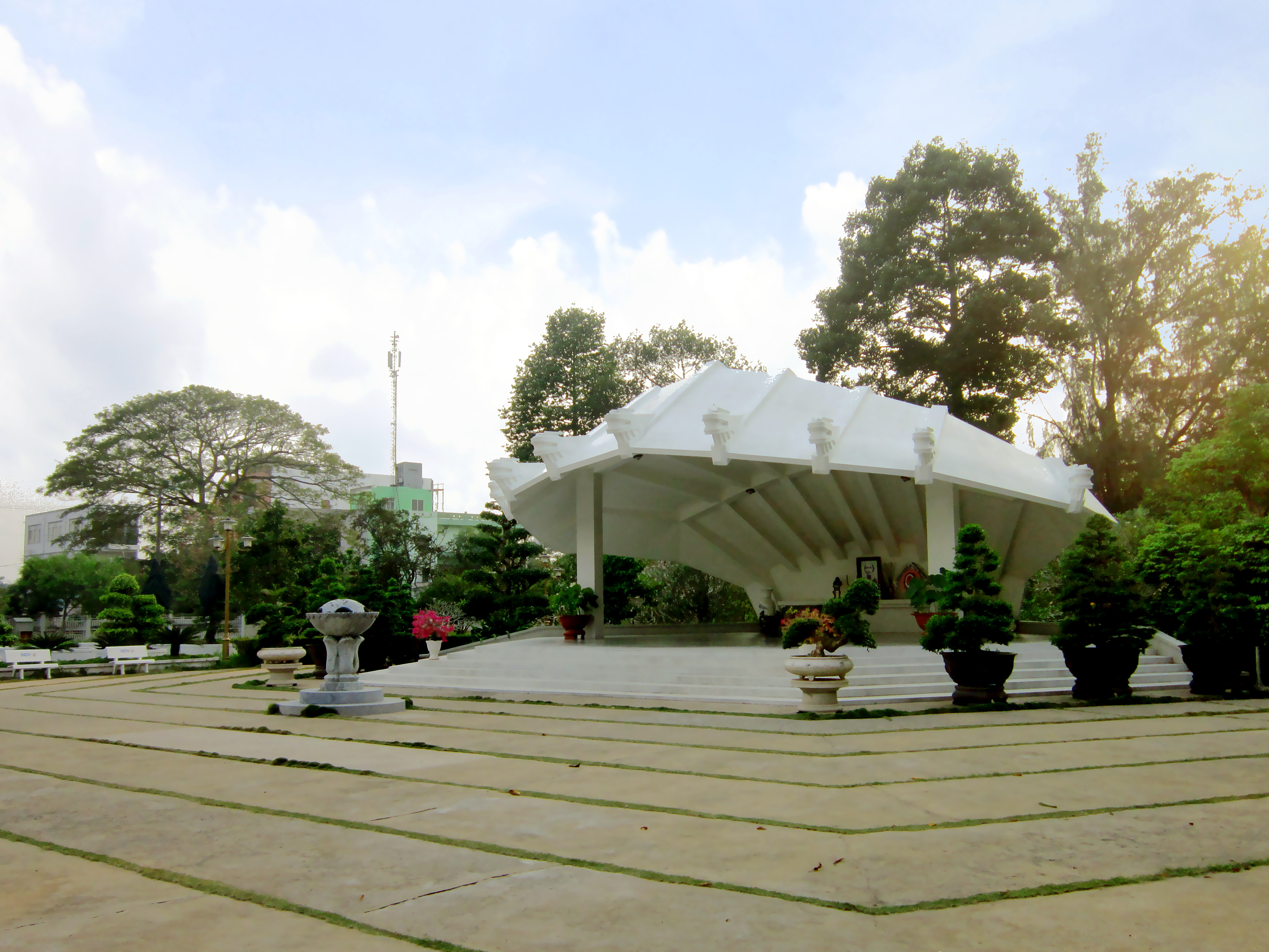 Mộ Nguyễn Sinh Sắc (1862–1929) trong Khu di tích Nguyễn Sinh Sắc tọa lạc số 123/1 Phạm Hữu Lầu, thuộc phường 4, thành phố Cao Lãnh, tỉnh Đồng Tháp, Việt Nam.